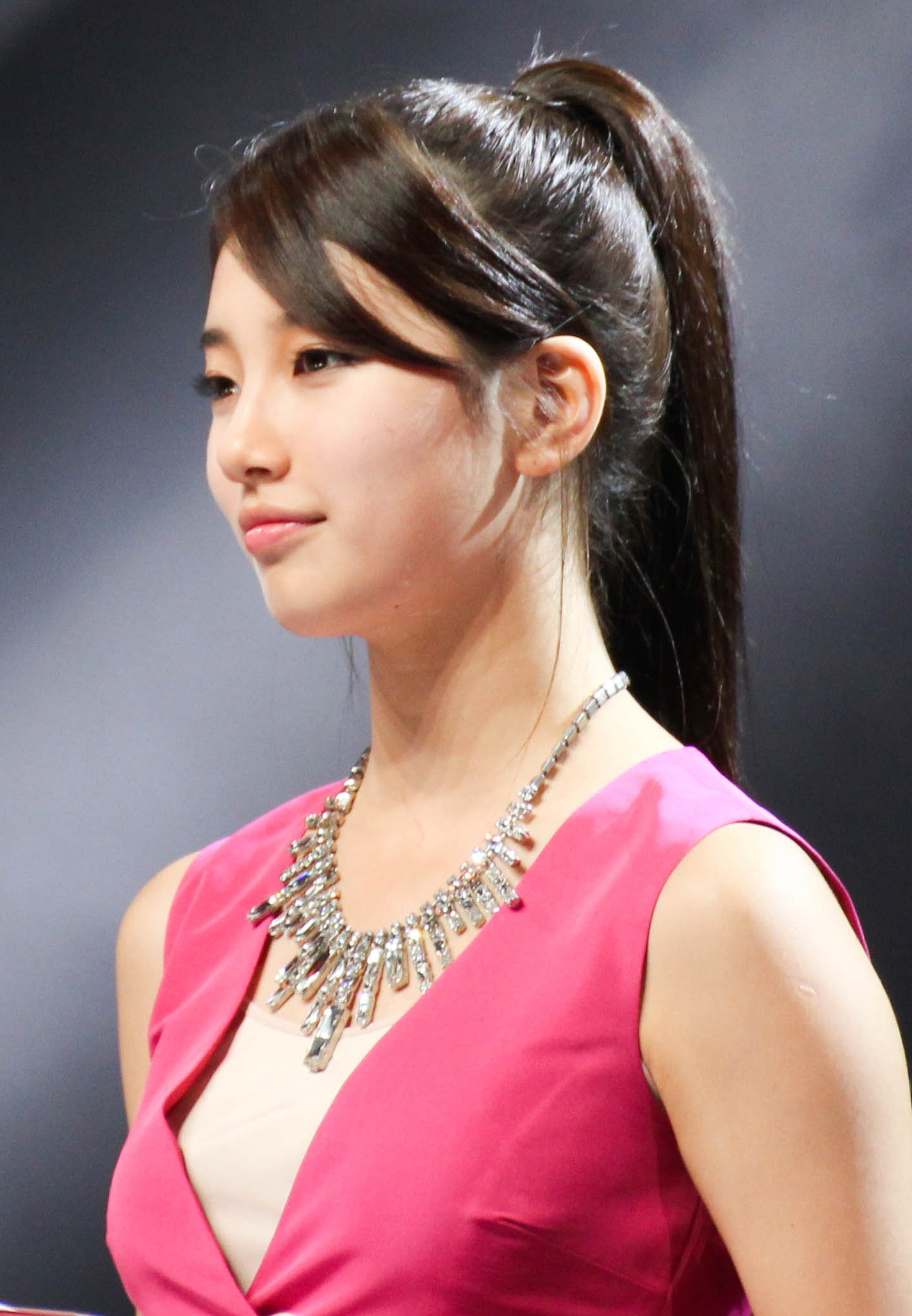 12.11.8 MBC 대학가요제 수지 직찍 by씨원한콜라